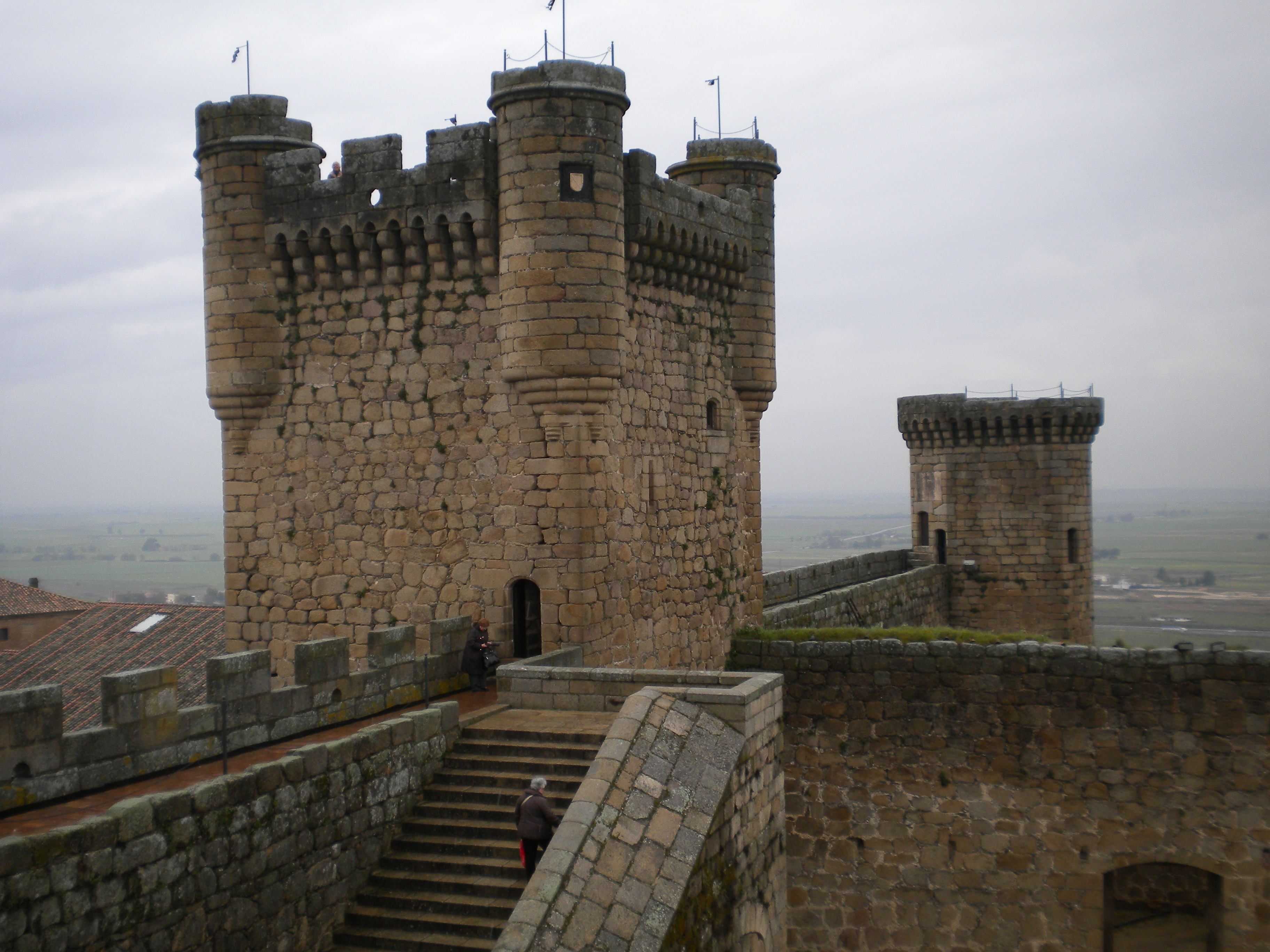 Torreta del castell d'Oropesa (Toledo)